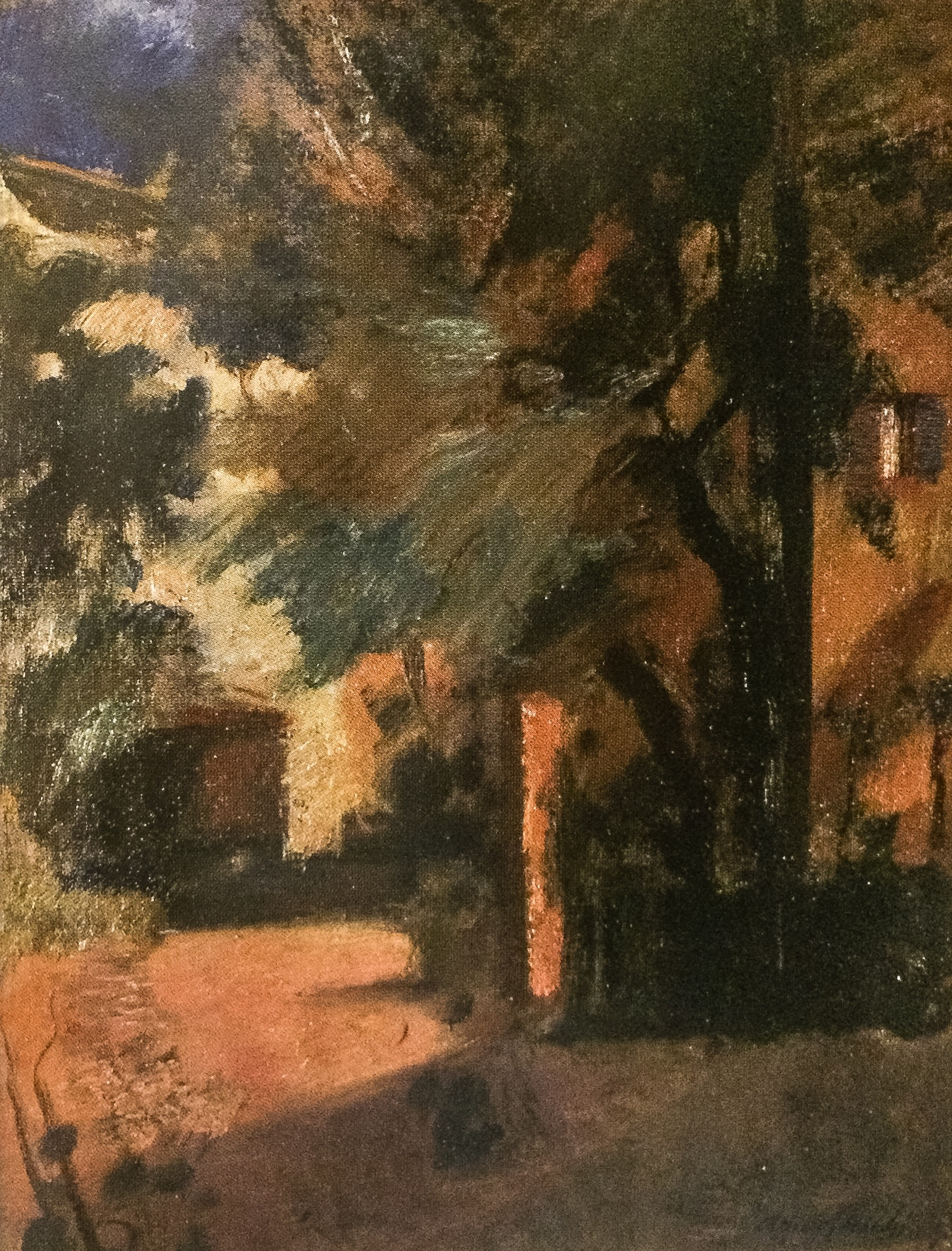 s.d, Fondazione Montanelli-Bassi